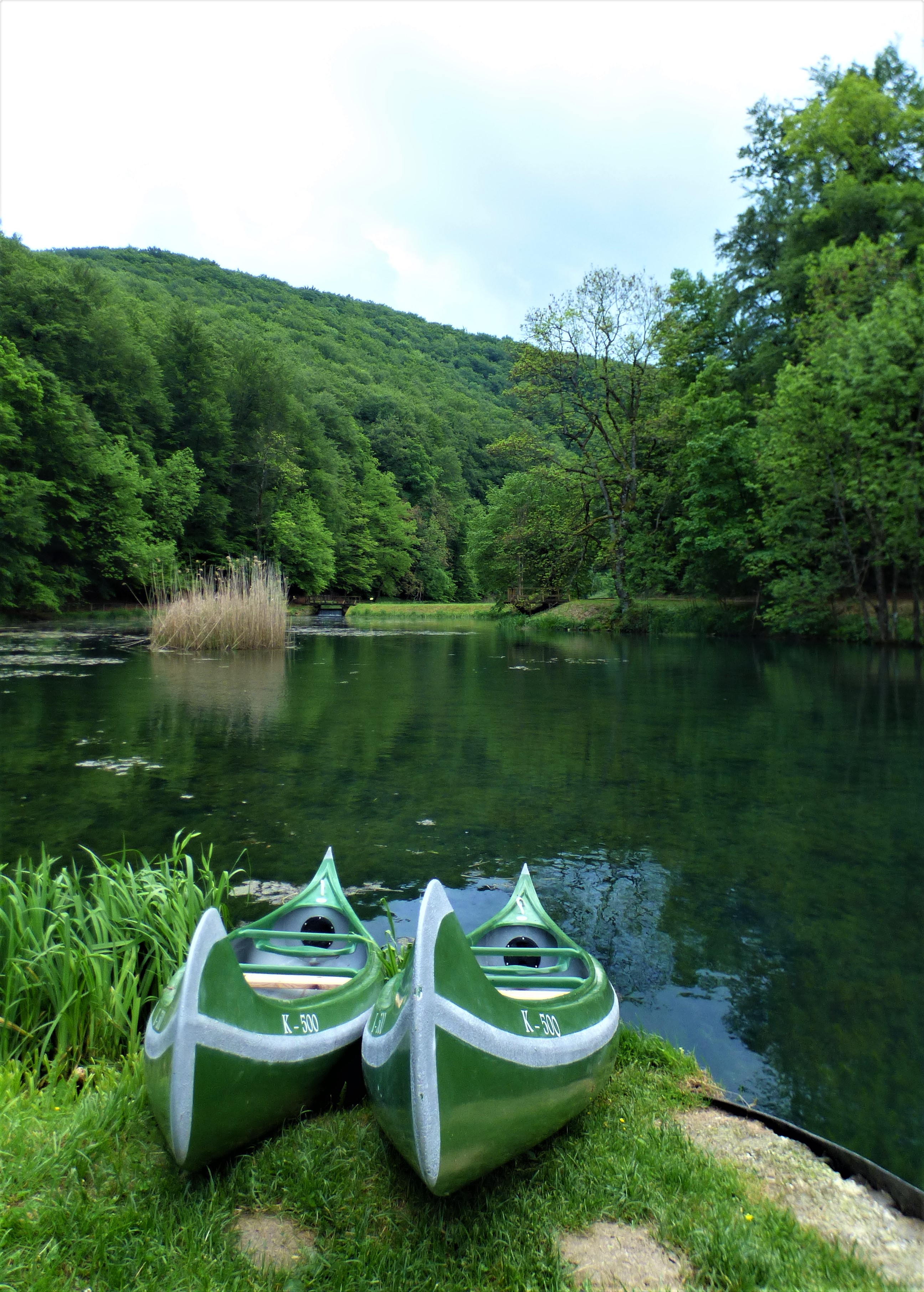 Jankovac- PP Papuk